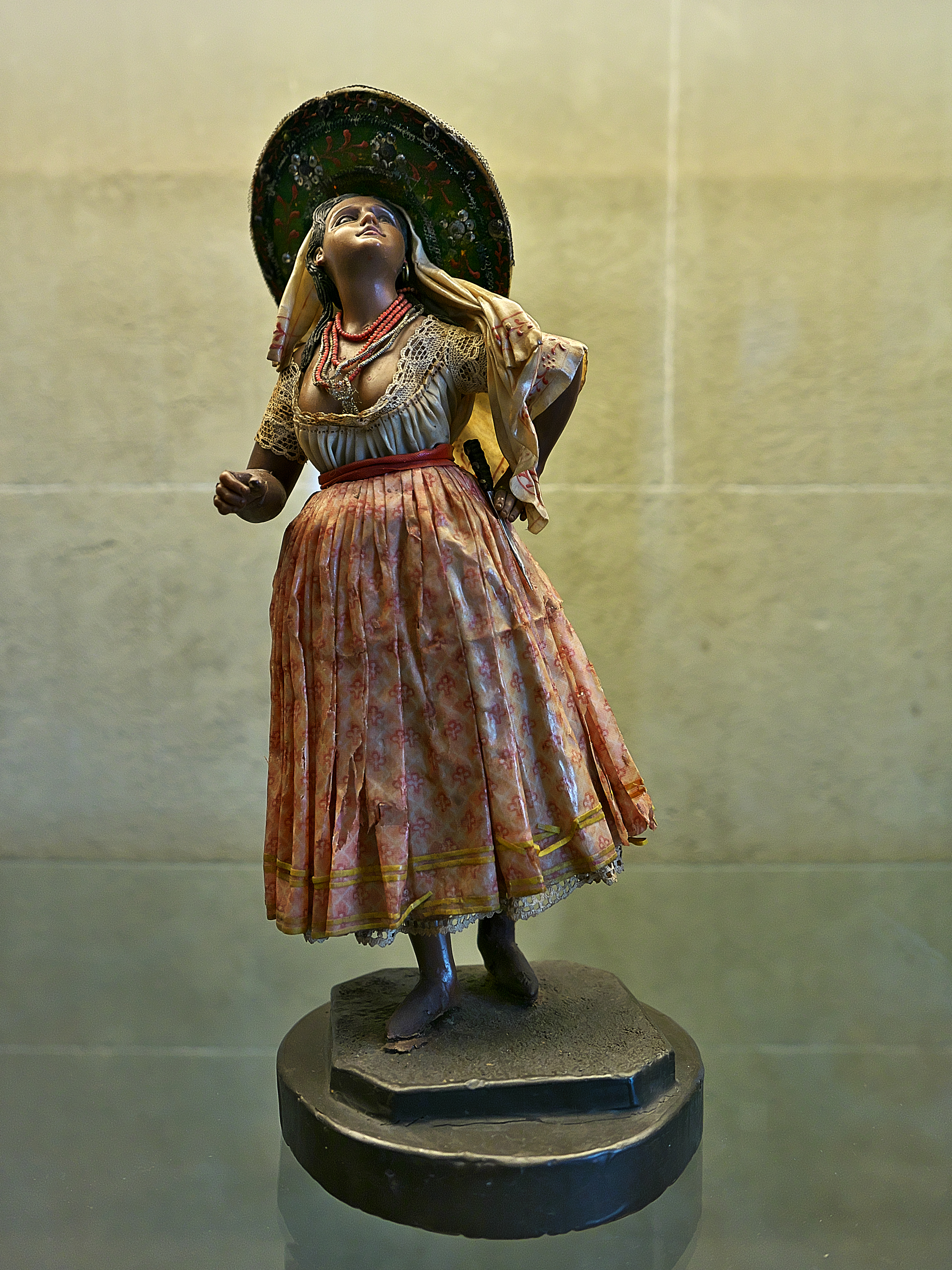 Figura de cera modelada sobre alma de resina y alambre, tela y papel encerados, siglo XIX. Vestimenta emblemática de la mujer mexicana.